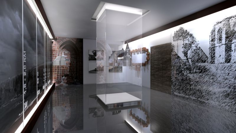 Historia Trzęsacza przedstawiona za pomocą najnowocześniejszych technologii